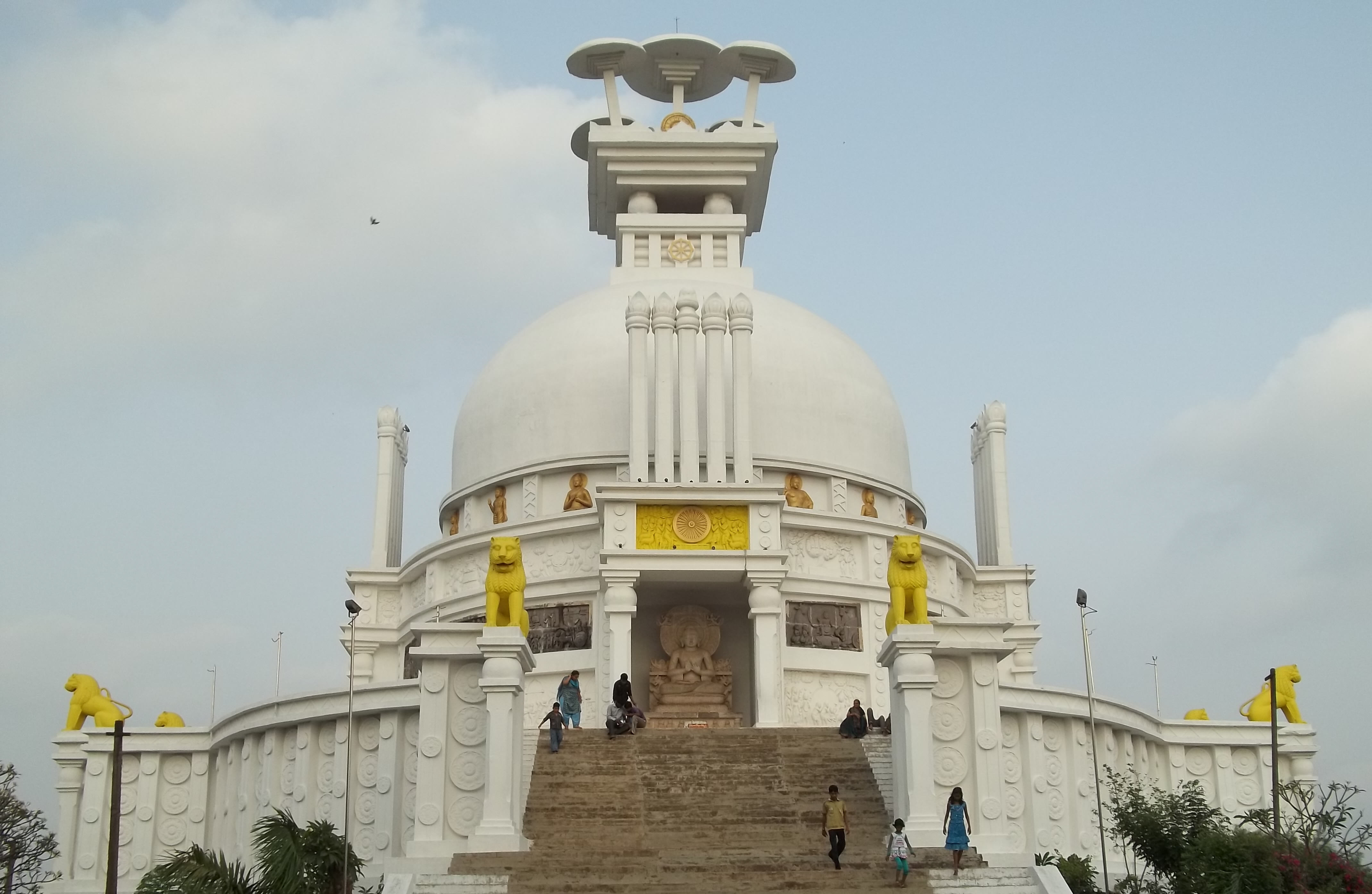 Dhauli Peace Pagoda